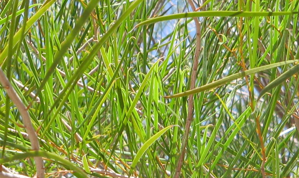 Acacia microneura Foliage Phoenix Desert Botanical Gardens